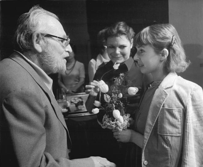 ADN-ZB Rehfeld 19.5.80 Berlin: Die herzlichsten Glückwünsche zum 80. Geburtstag nahm der Schauspieler, Regisseur und Präsident des Verbandes der Theaterschaffenden, Wolfgang Heinz, auf einer Gratulationscour im Deutschen Theater entgegen. Zu den Gratulanten gehörten auch Simone von Zglinicki (r.) und Katja Paryla.